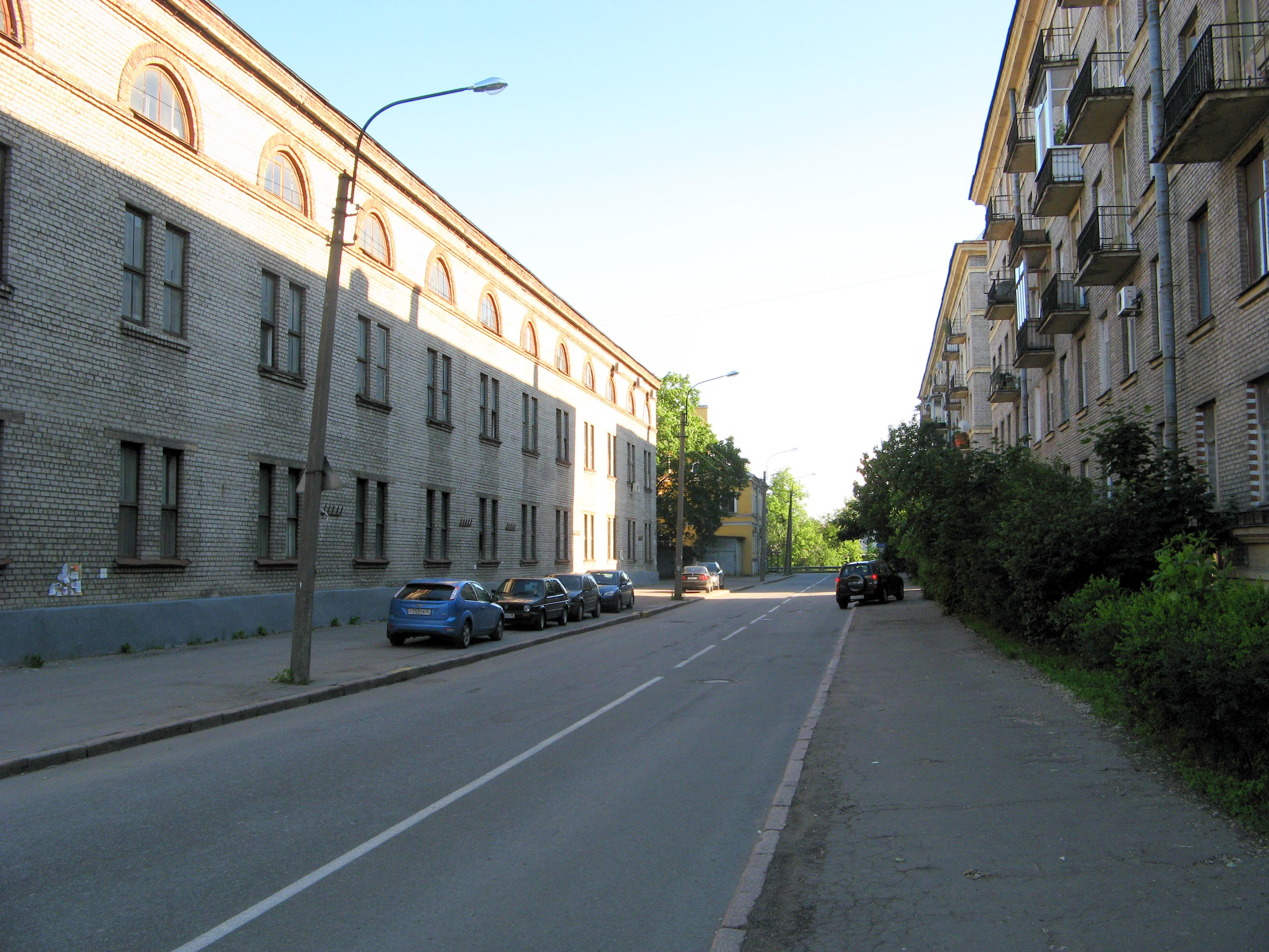 Сердобольская улица (Санкт-Петербург), вид на юг от перекрёстка с Лисичанской улицей